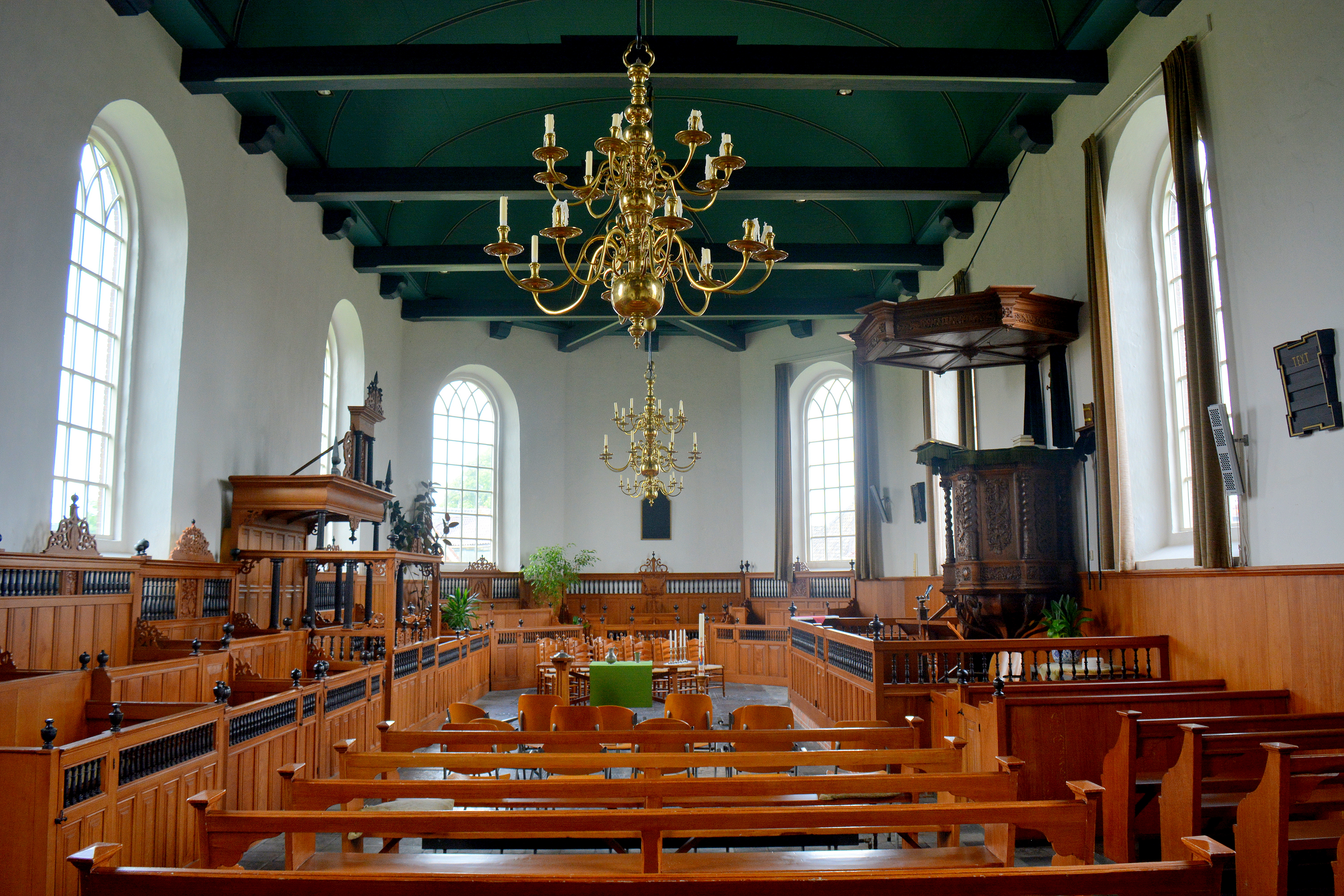 Burum, prot. Terpkerk, interieur